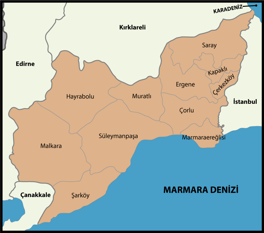 Tekirdağ'ın ilçelerini gösteren harita. Haritanın Tekirdağ,Çevre iller ve deniz kısımlarının çizimi için Atıf: By User:The Emirr- By The Emirr - Yükleyenin kendi çalışması, CC BY 3.0